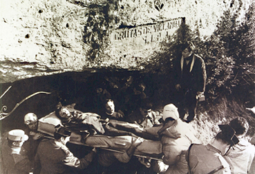 rescate de espeleólogos accidentados en 1972